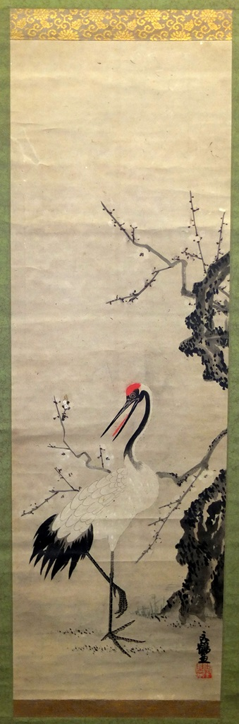 村岡山名七代・山名義徳公（雅号：文鶴）筆。